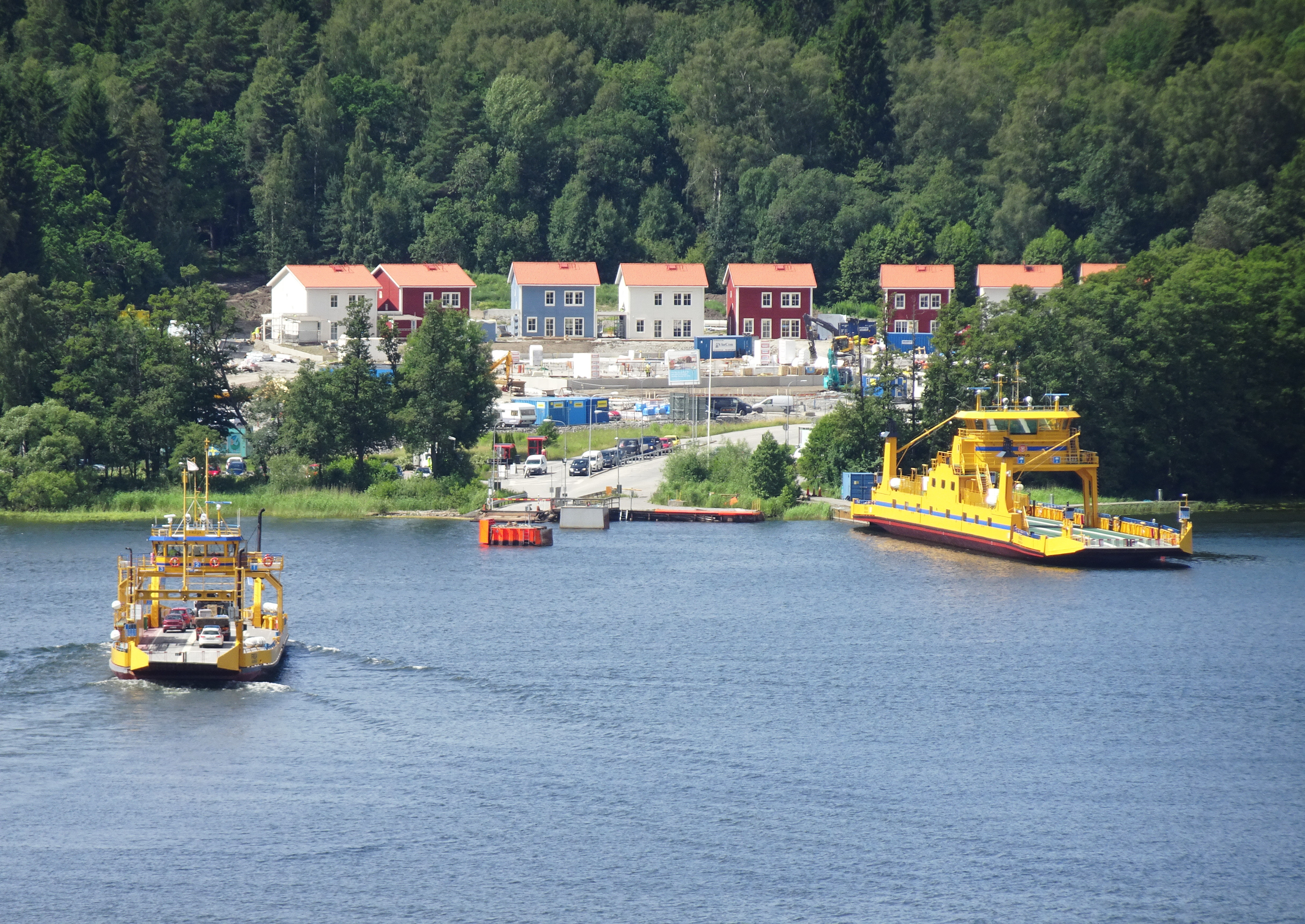 Ekeröledens färjeläge på Ekerö